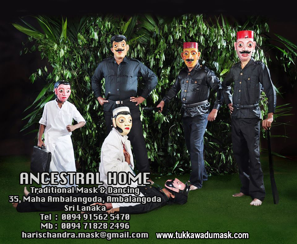 සිංහල: අම්බලන්ගොඩ ටුක්කාවඩු පරපුරේ කෝලම් නැටුම් අංගයකි